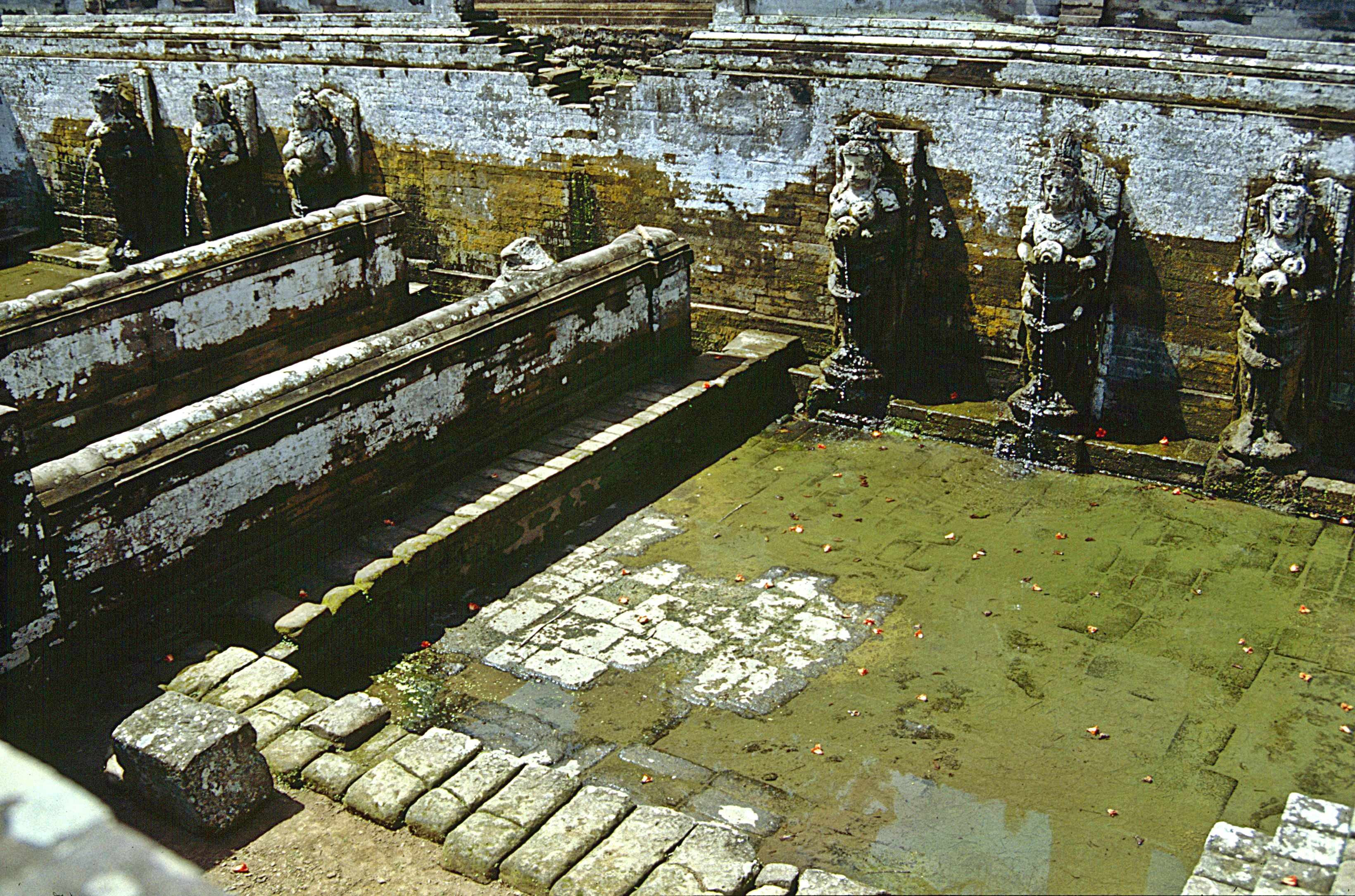 Goa Gajah